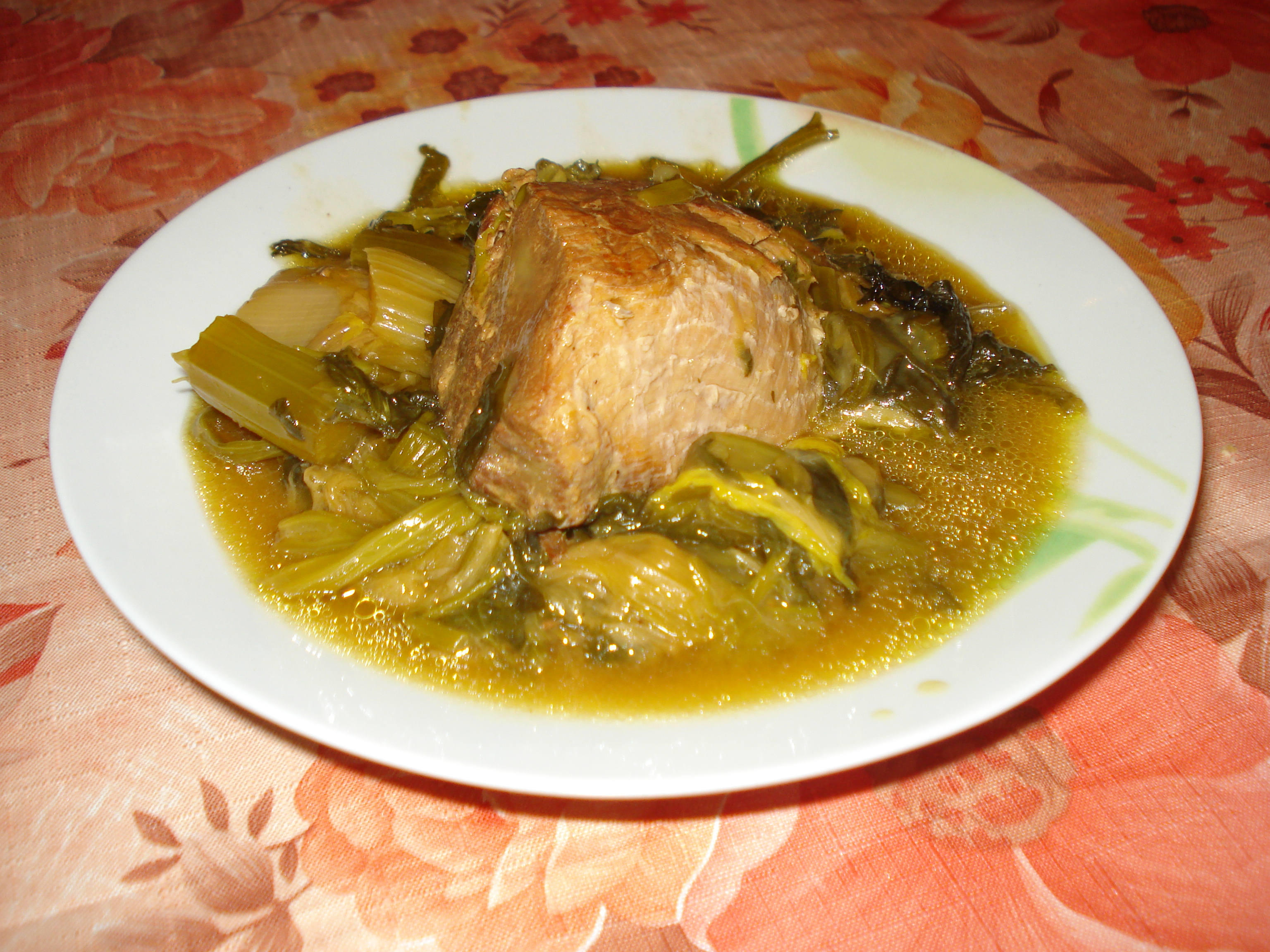 Porc amb porro i api, plat grec: Χοιρινό πρασοσέλινο, (Khirinó prasosélino)